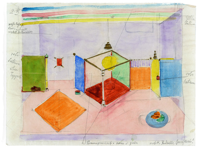 Entwurf zur Oper "Das Nusch-Nuschi" von Paul Hindemith, UA Stuttgart 1921. Provenienz: Nachlass eines Bühnenbildners und Vorstandschefs der Gewandabteilung des Königlichen Hoftheaters.